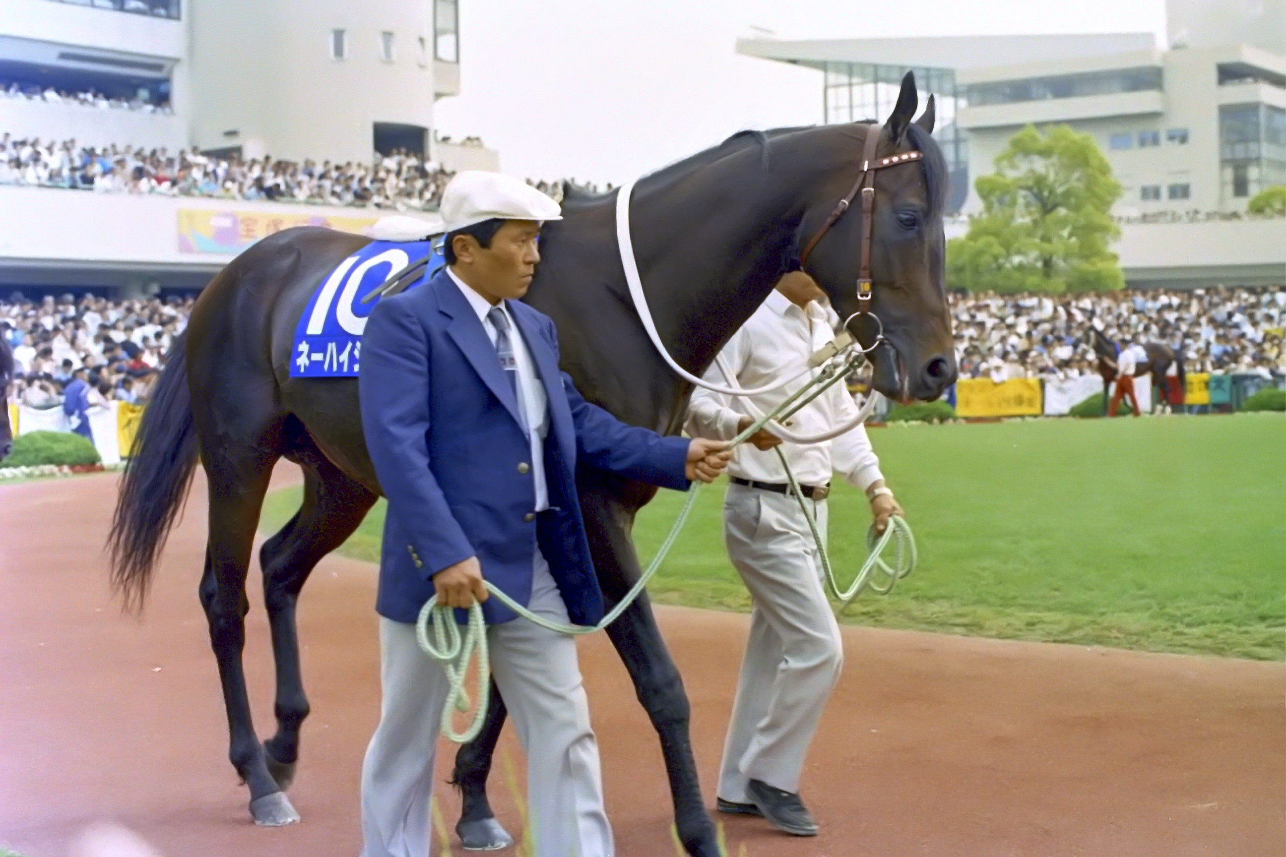 ネーハイシーザー 1995年6月4日 京都競馬場